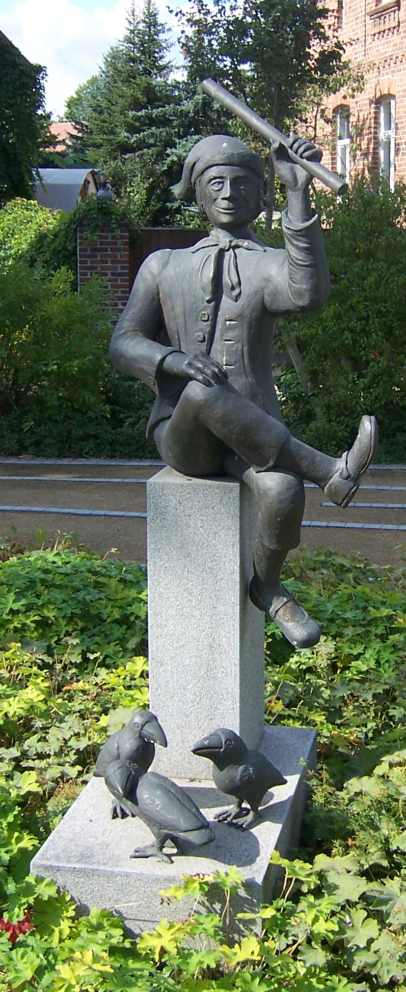 Krabatstatue in Schwarzkollm Hornjoserbsce: Krabatowa postawa w Čornym Chołmcu